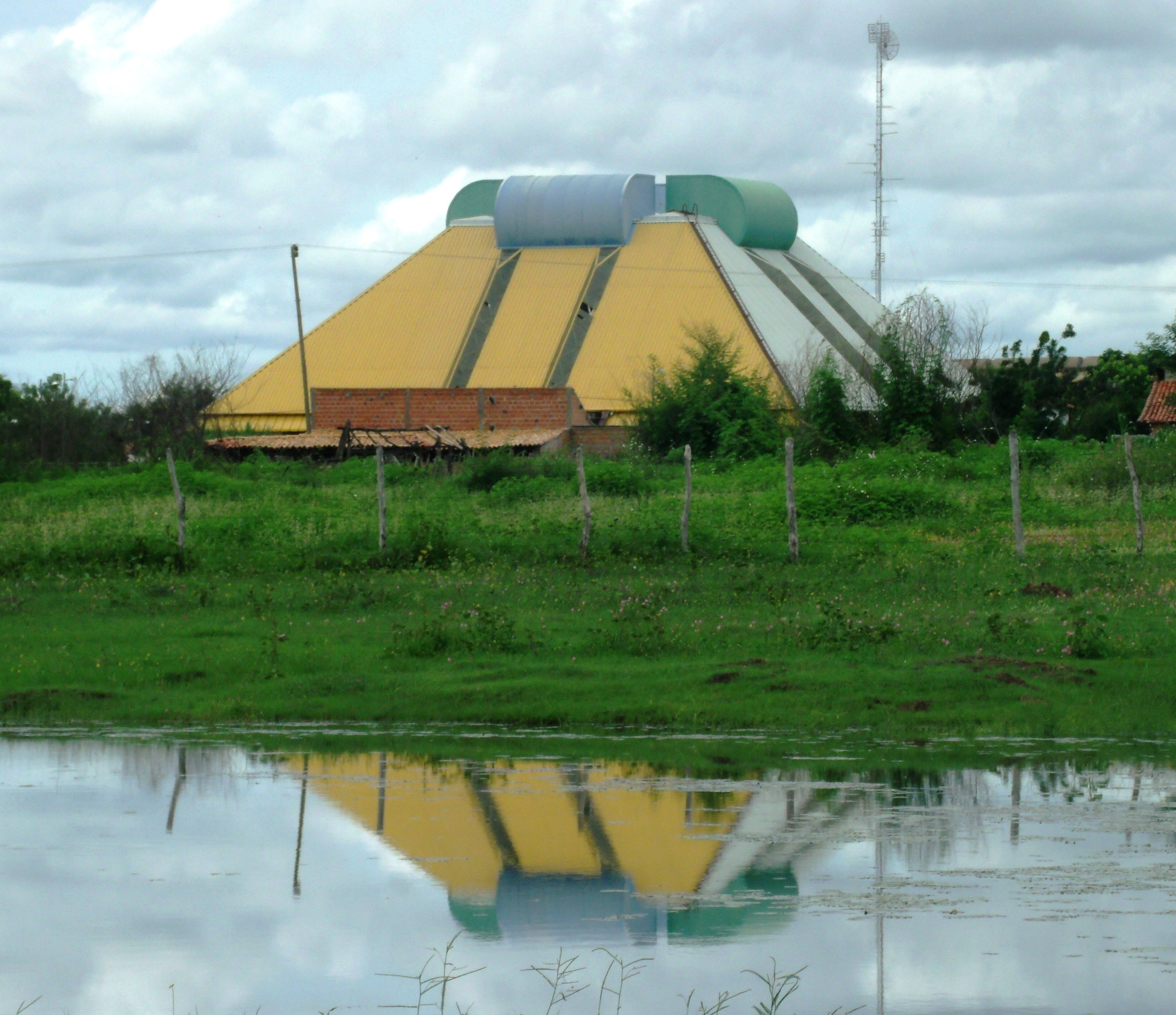 Vista da cobertura da quadra poliespostiva do CAIC de Campo Maior refletido em água. |S